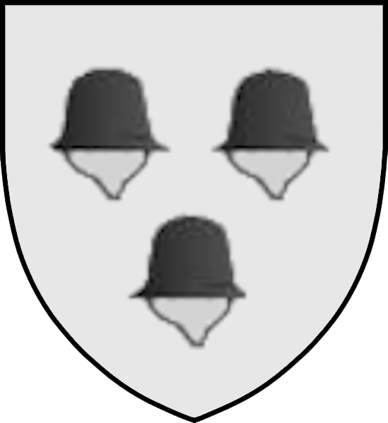 Alternativ vapensköld för svenska frälsesätten Tysk (tre stormhattar)